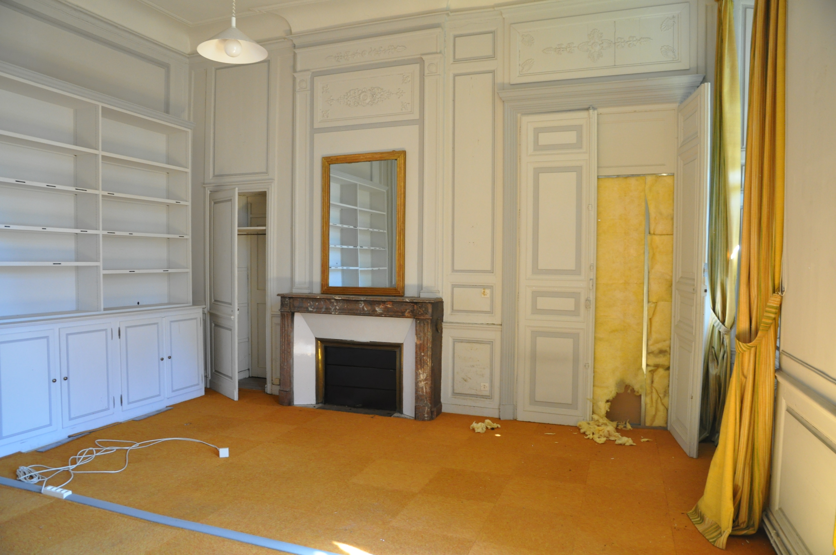 don carlos